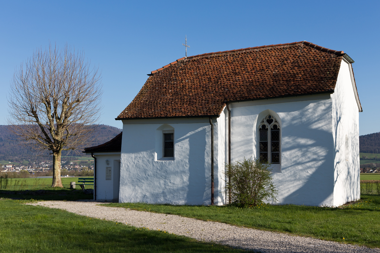 Die alte Kirche Saint Barthélémy am Dorfrand von Courrendlin (JU)